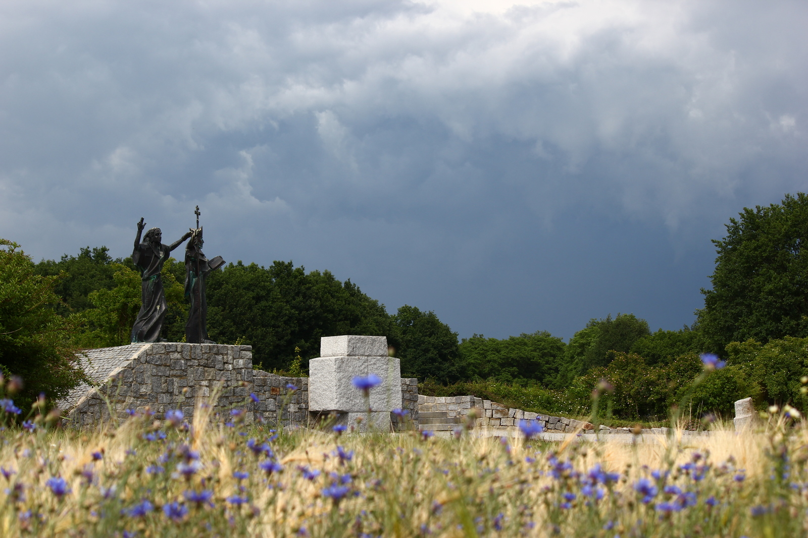 Die Slawenapostel Kyrill und Method am Milleniumsdenkmal bei Bautzen in der sorbischen Oberlausitz. Hornjoserbsce: Cyril a Metod, japoštołaj Słowjanow, při Milenijowym pomniku blisko Smochćic w serbskej Łužicy.